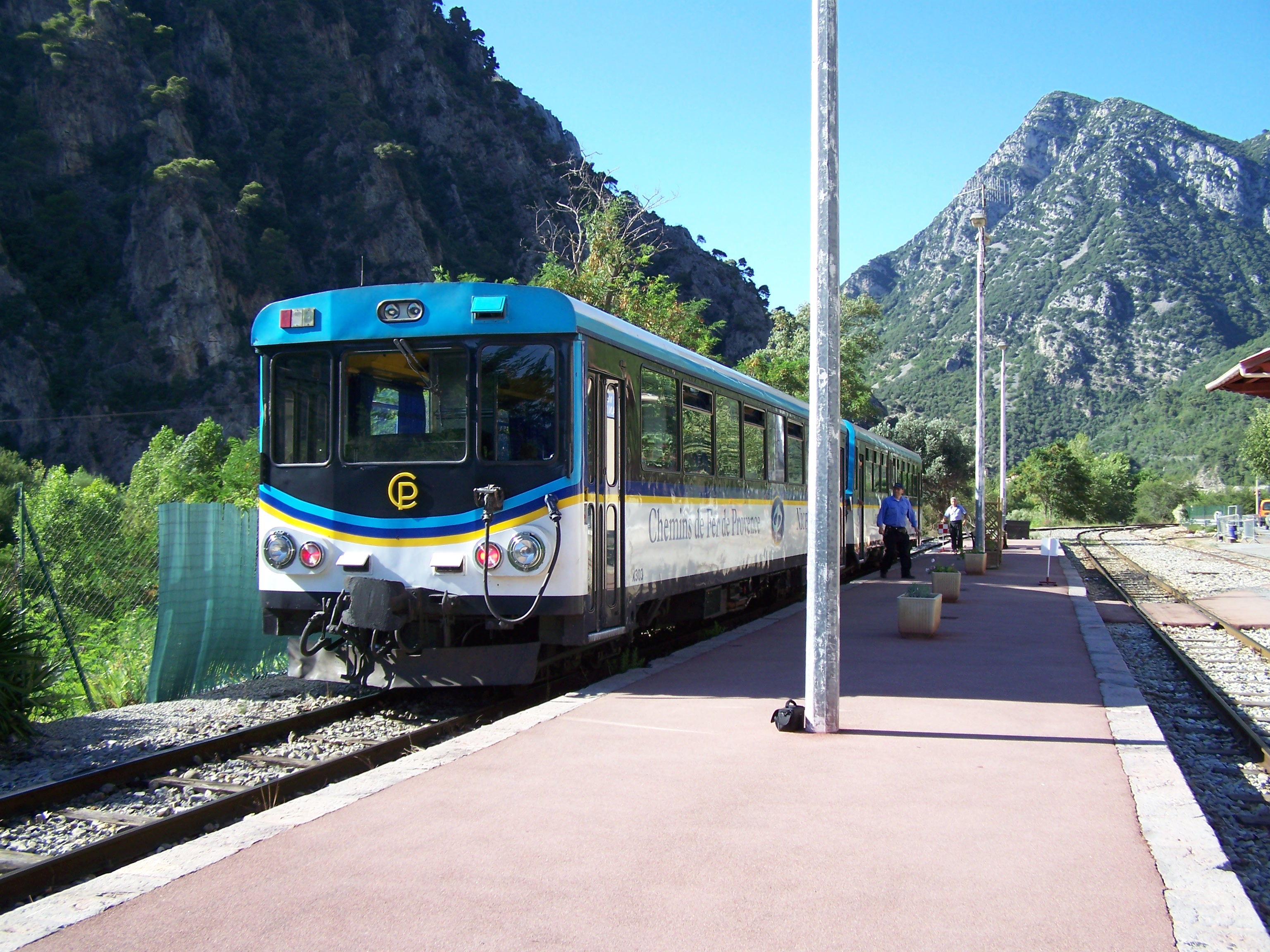 "Train des Pignes" à la gare de Plan du Var (Alpes-Maritimes, France)